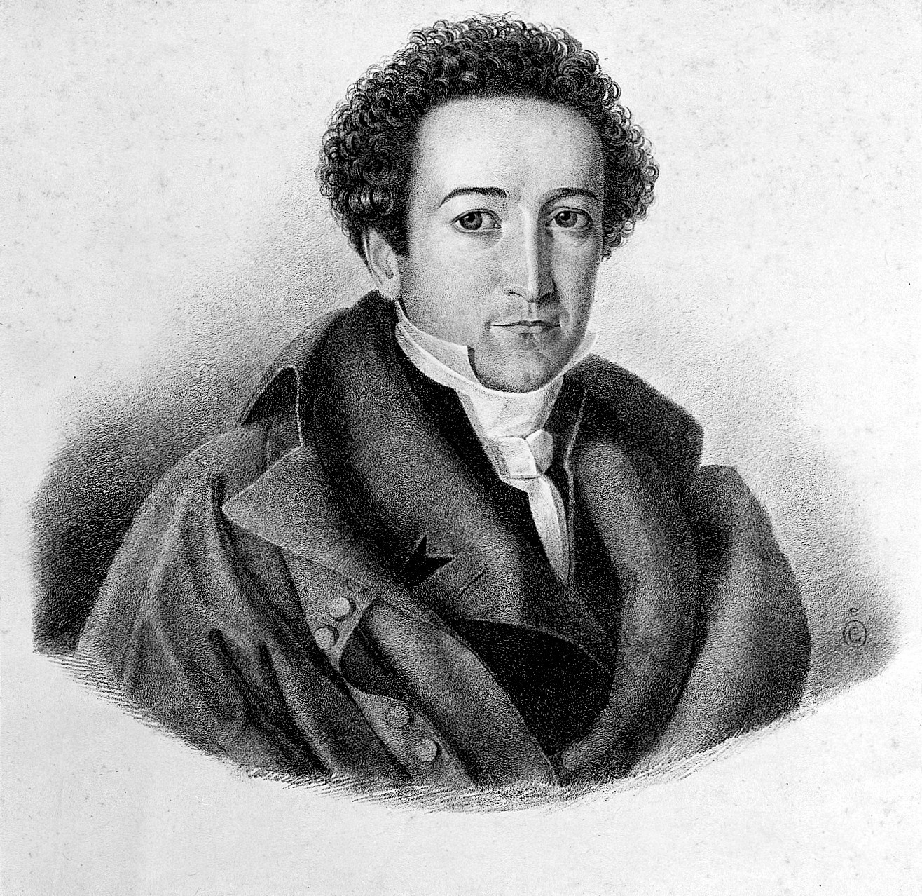 Karl Friedrich Heinrich Marx. Lithograph. Iconographic Collections Keywords: Karl Friedrich Heinrich Marx